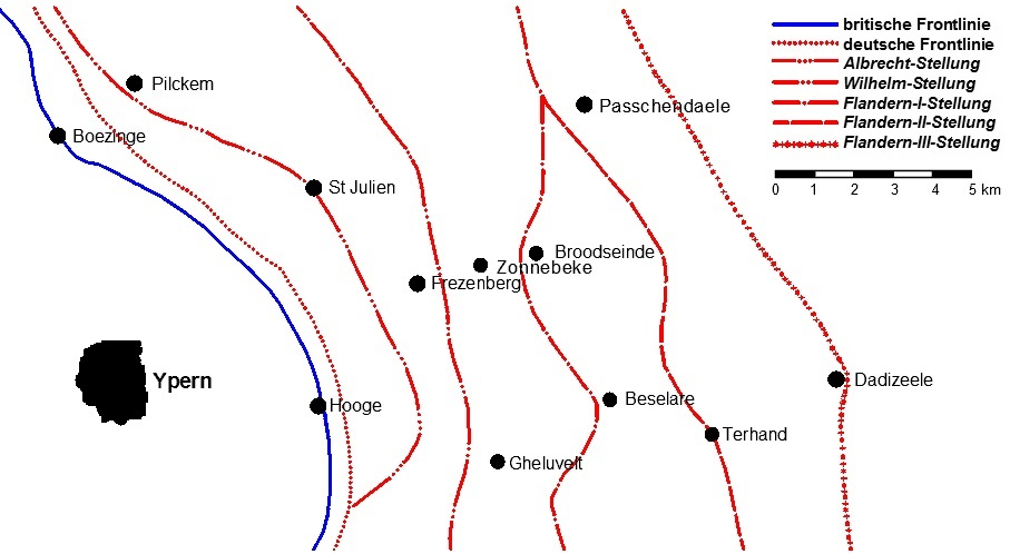 Deutsche Verteidigungsstellungen östlich von Ypern (Mitte 1917), mit Albrecht-Stellung, Wilhelm-Stellung, Flandern-I-Stellung, Flandern-II-Stellung und der Flandern-III-Stellung